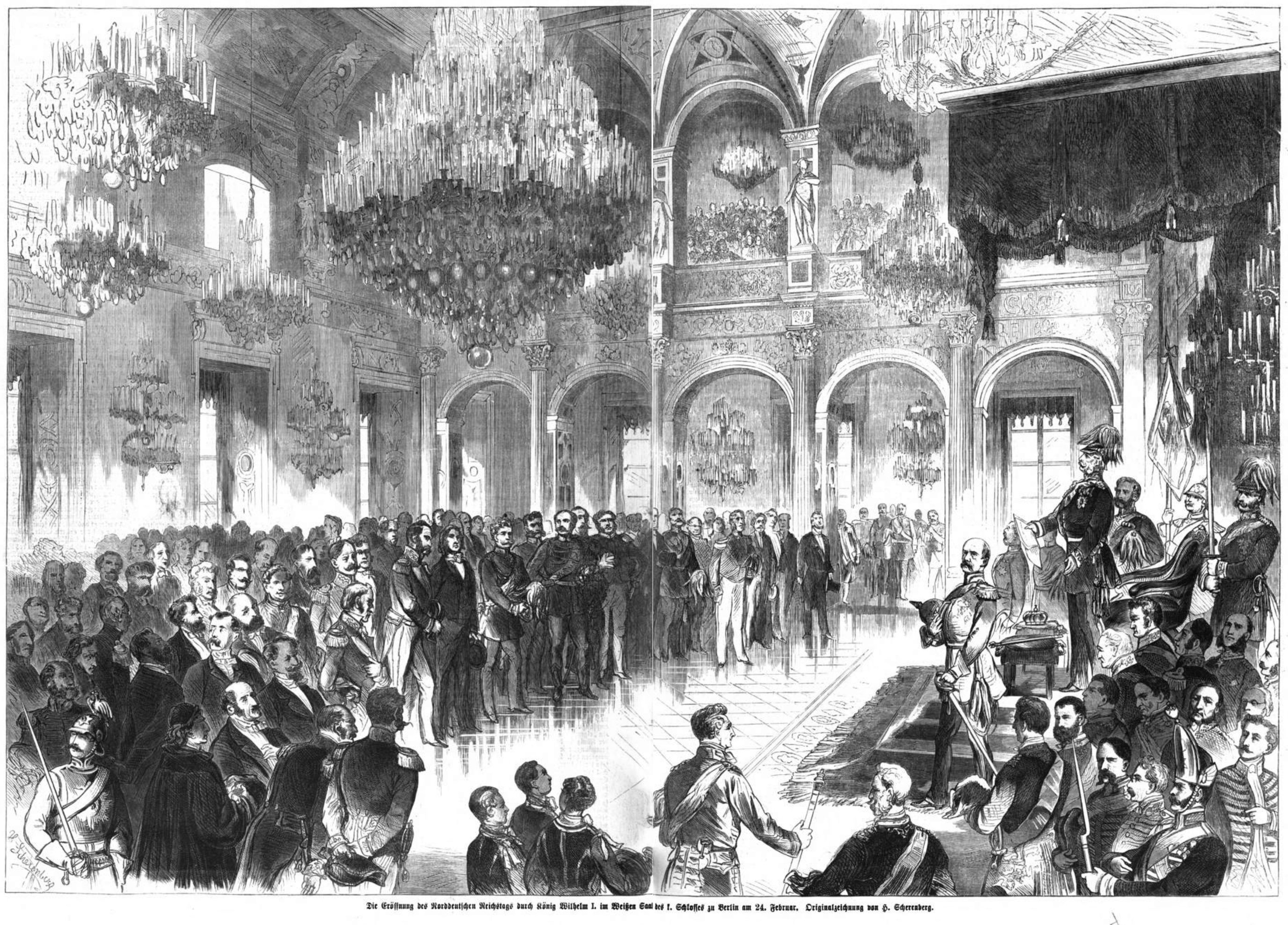 Leipziger Illustrirte Zeitung 2. März 1867. Eröffnung des Reichstags am 24. Februar 1867 im Weißen Saal des königlichen Schlosses. [Konstituierender Reichstag]